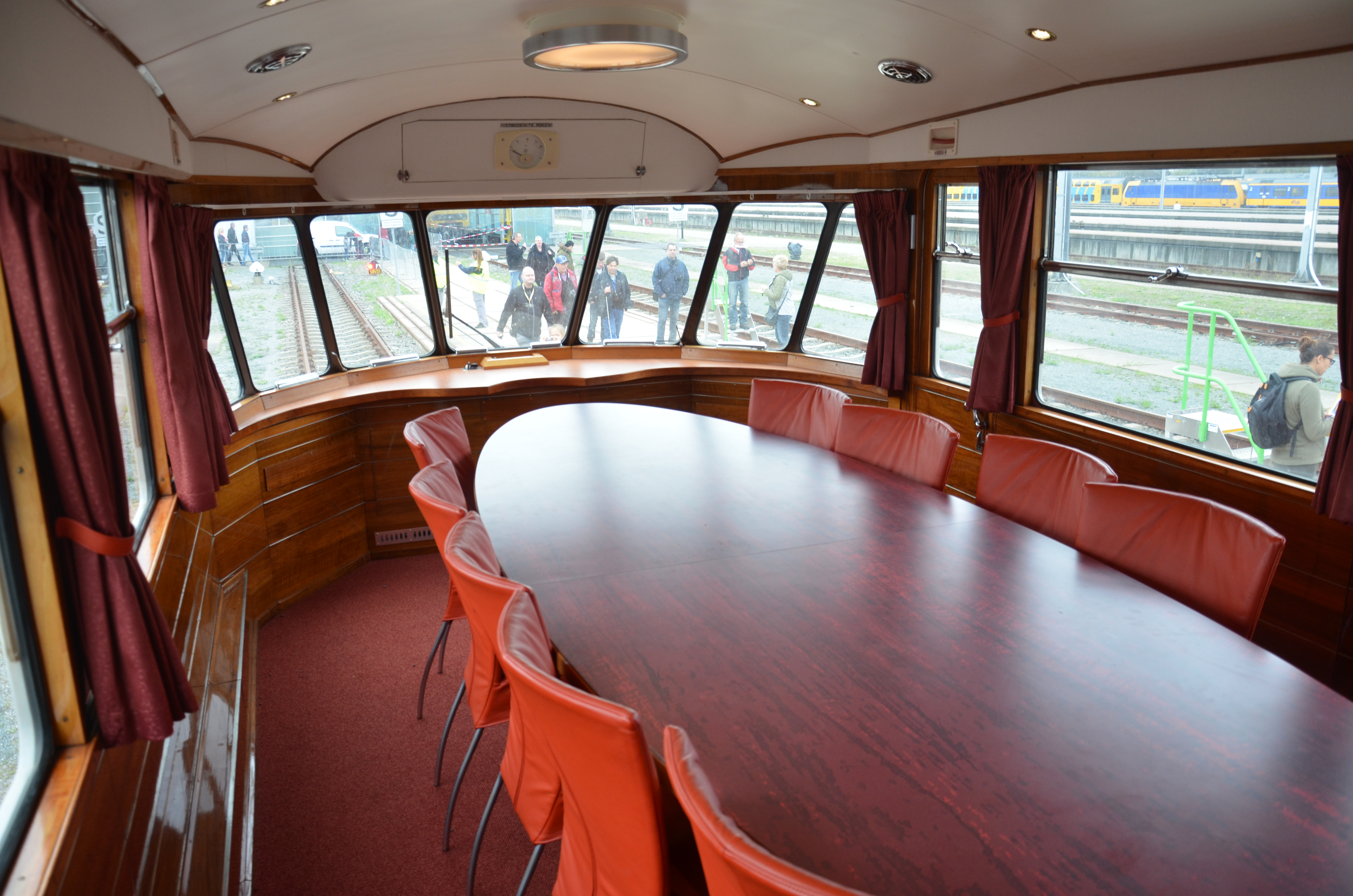 Het interieur van het motorrijtuig NS 20, bijgenaamd de Kameel.